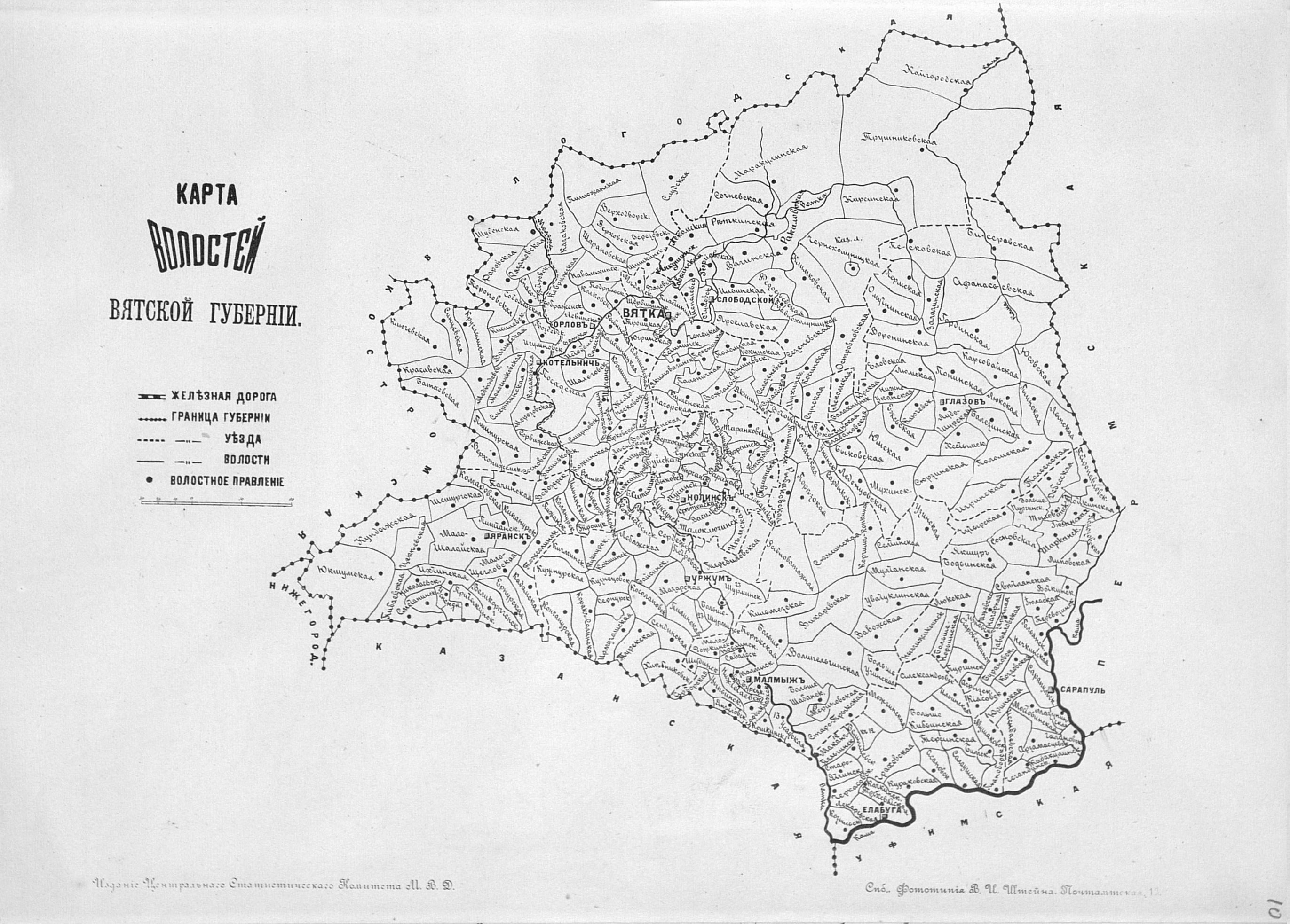 Карта волостей Вятской губернии